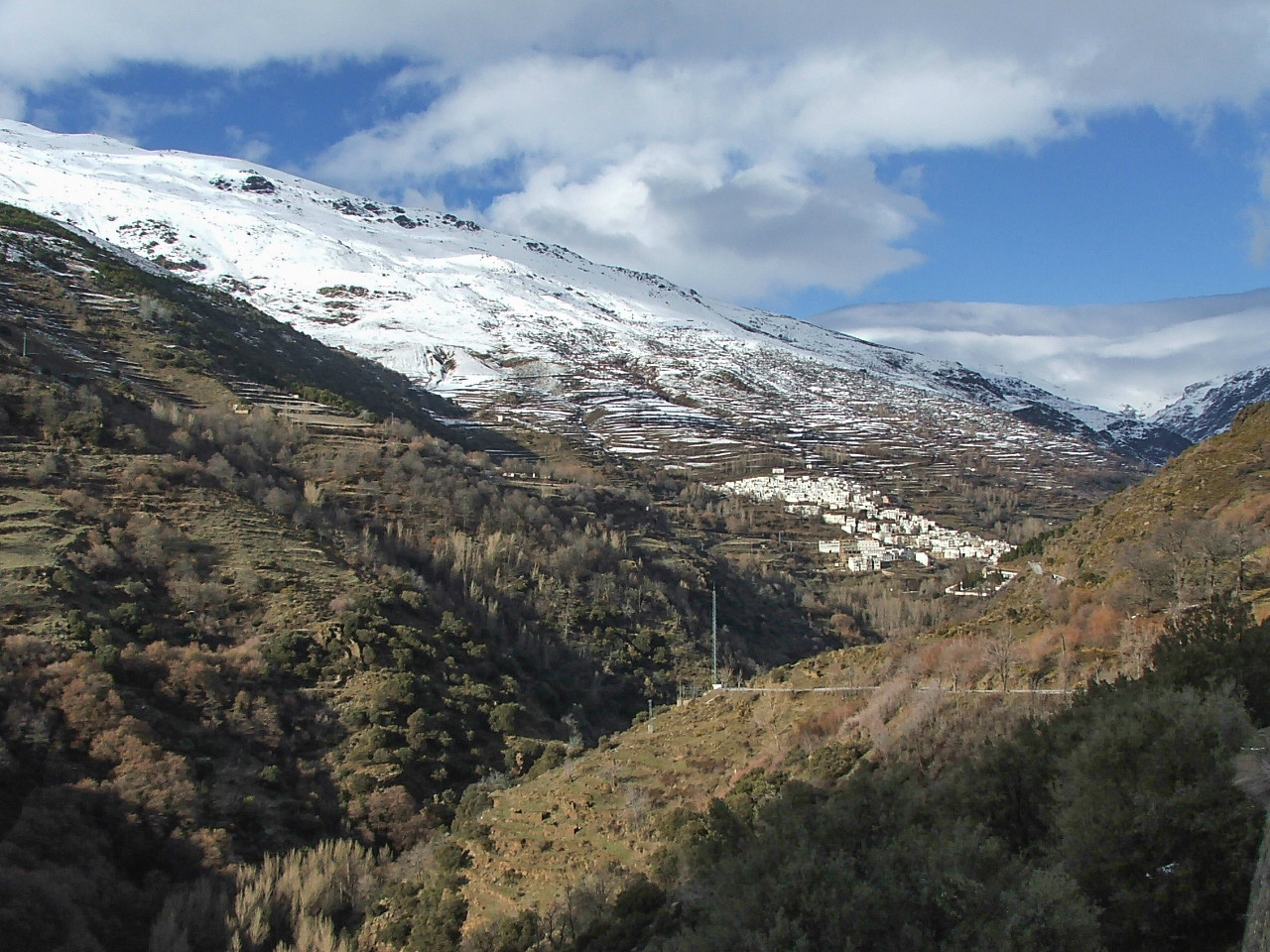 Vista general de Trevélez